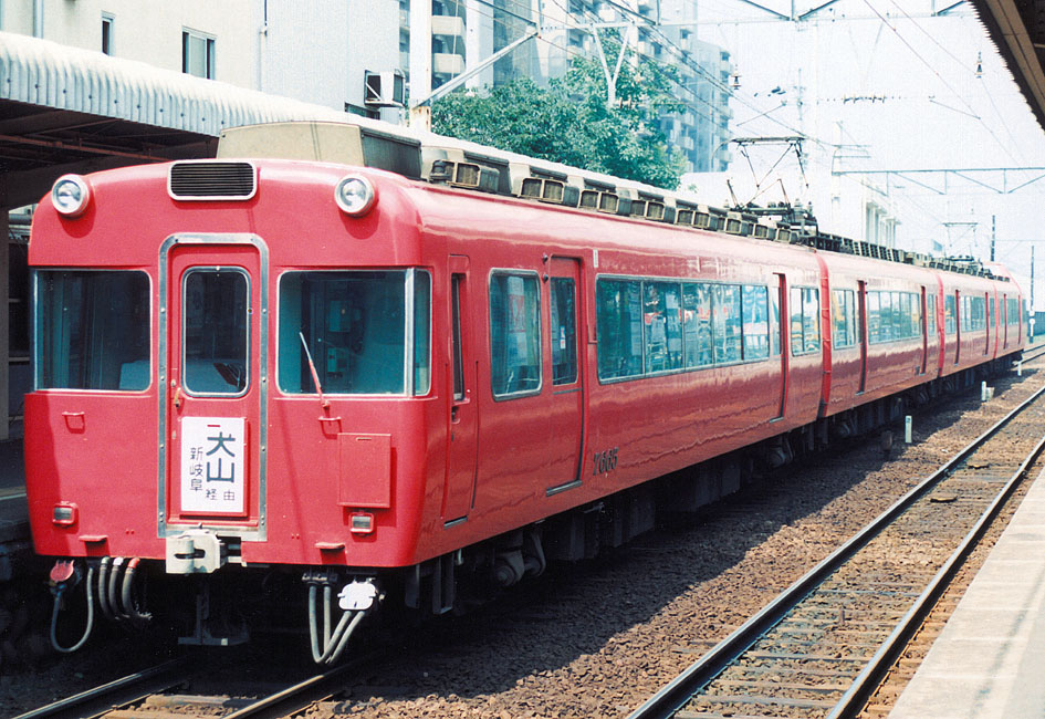 名古屋鉄道 7500系7665